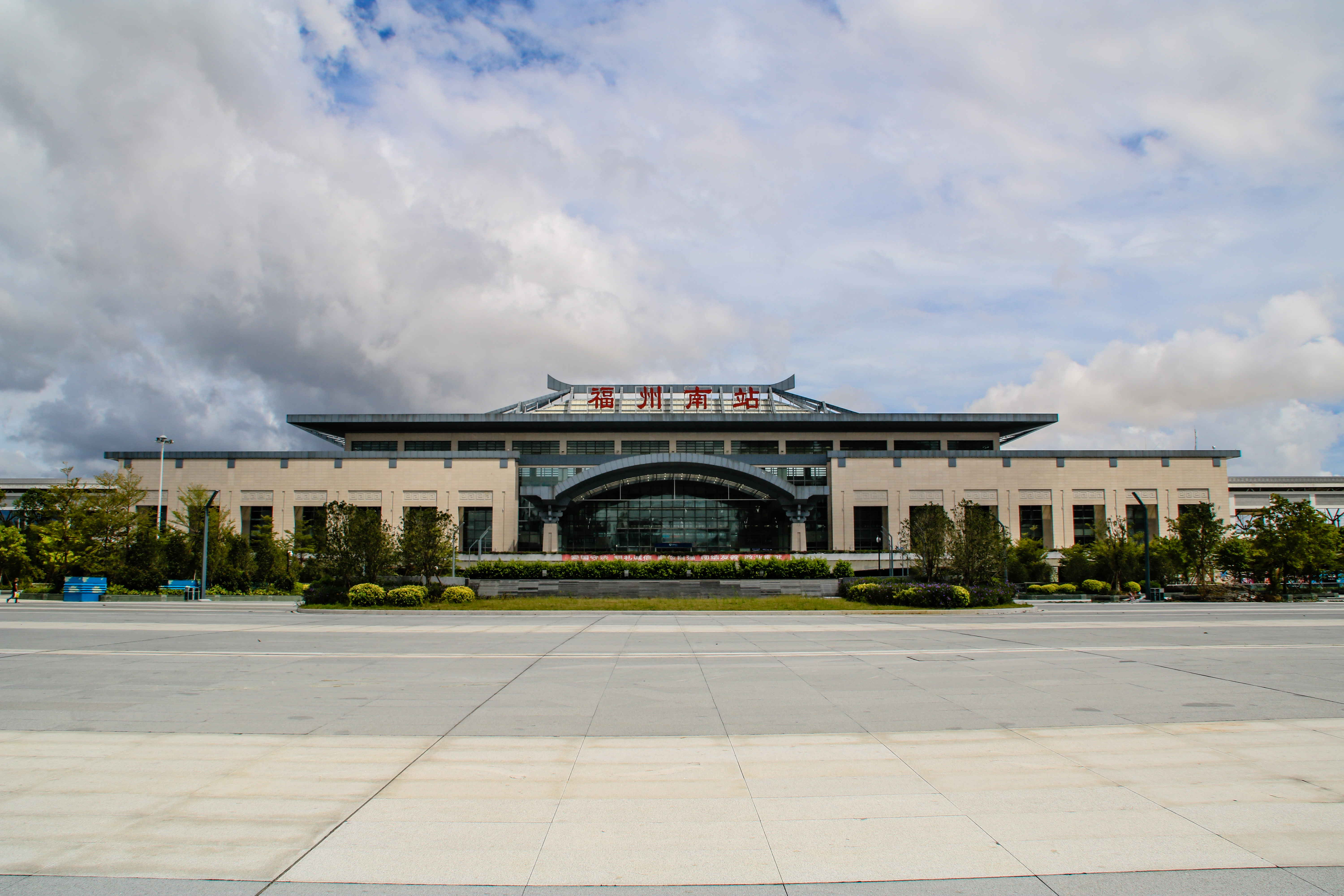 中文（中国大陆）: 福州南站西站房